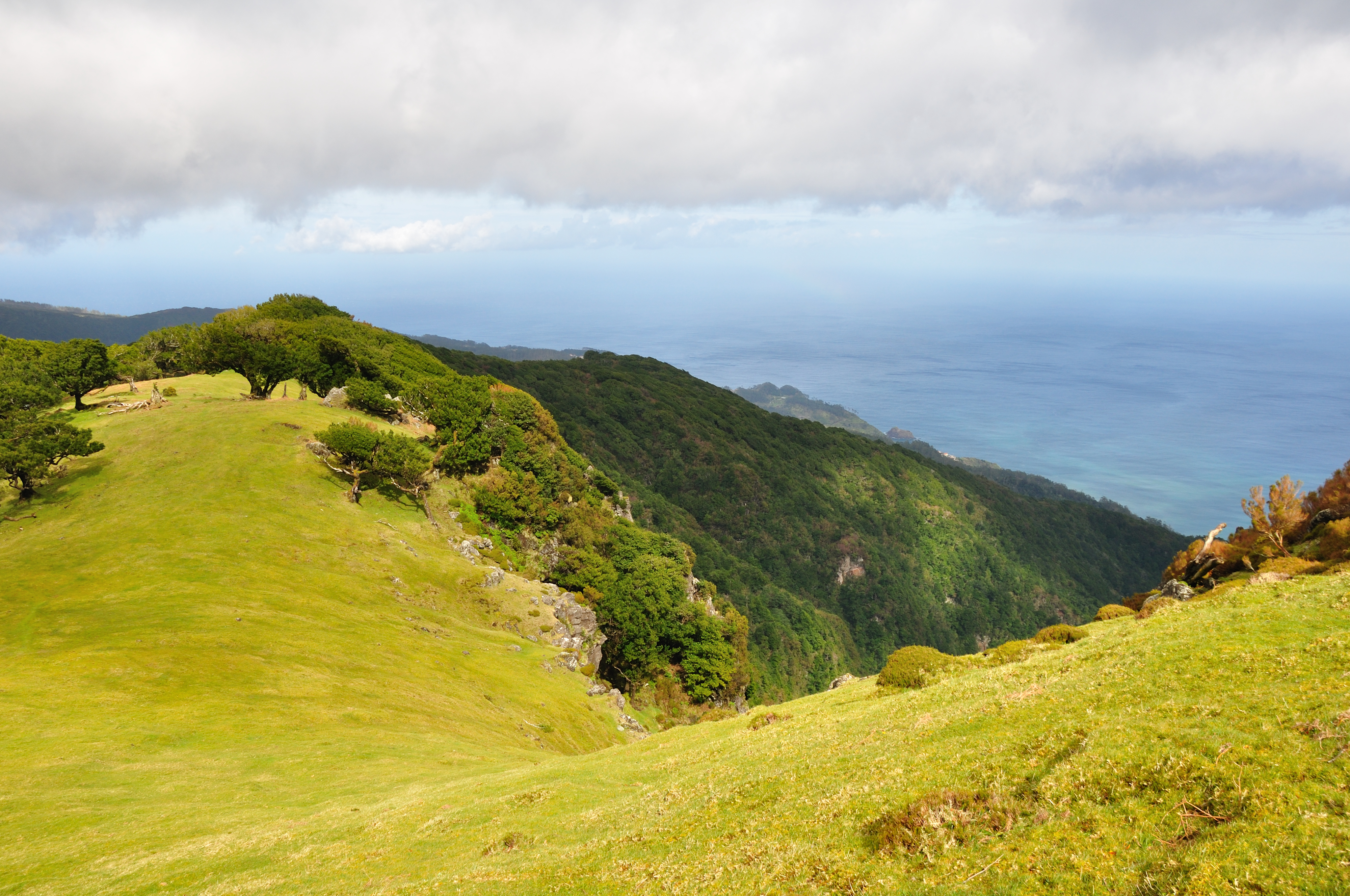 Portugal, Fanal